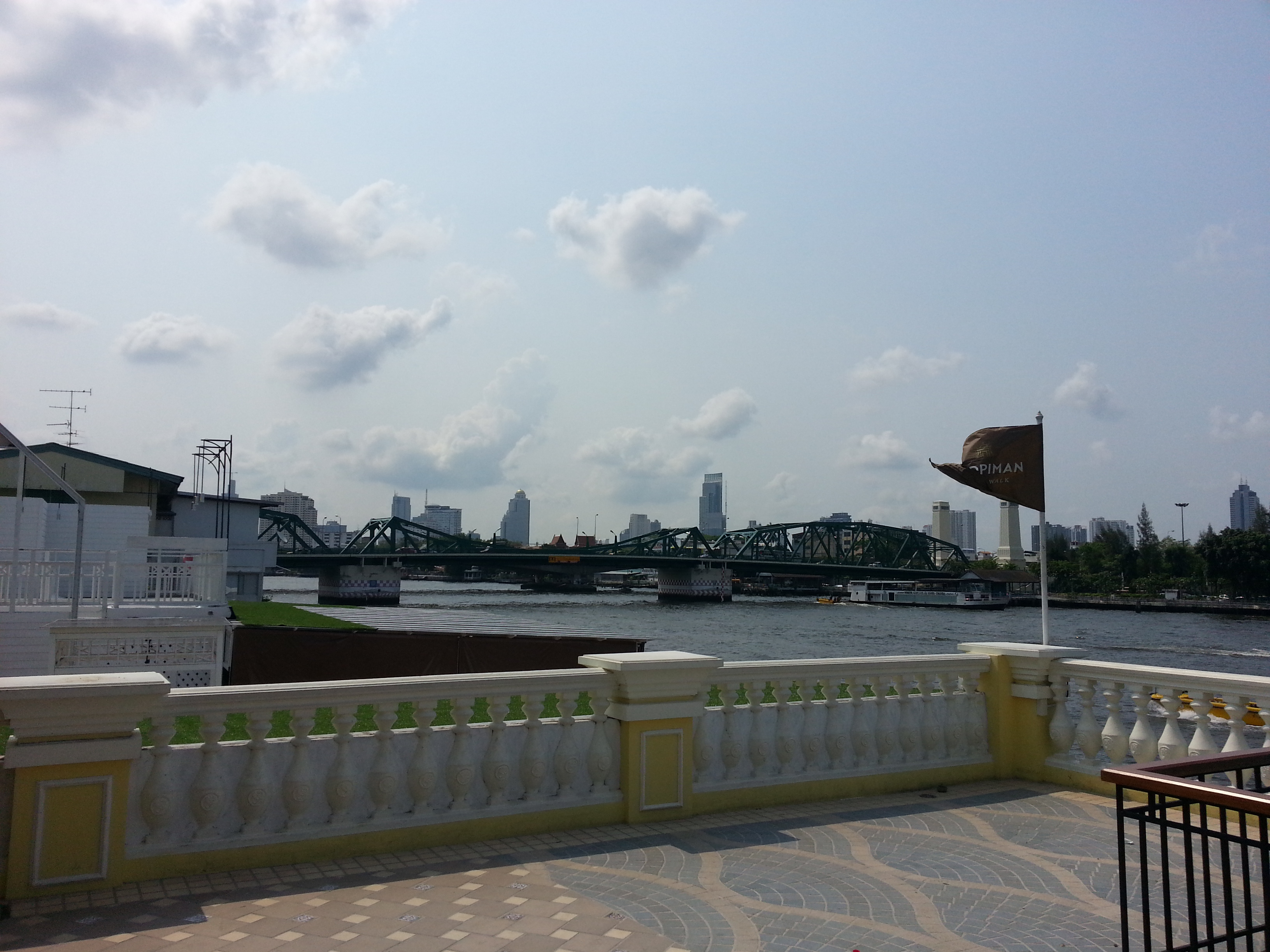 Wang Burapha Phirom, Phra Nakhon, Bangkok, Thailand